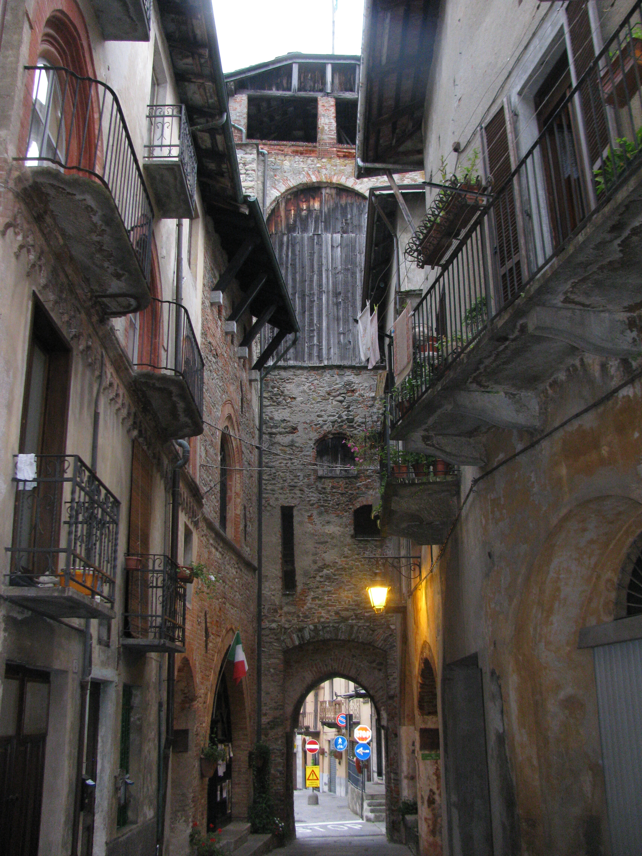 Torre civica di Aymone di Challant This is a photo of a monument which is part of cultural heritage of Italy.